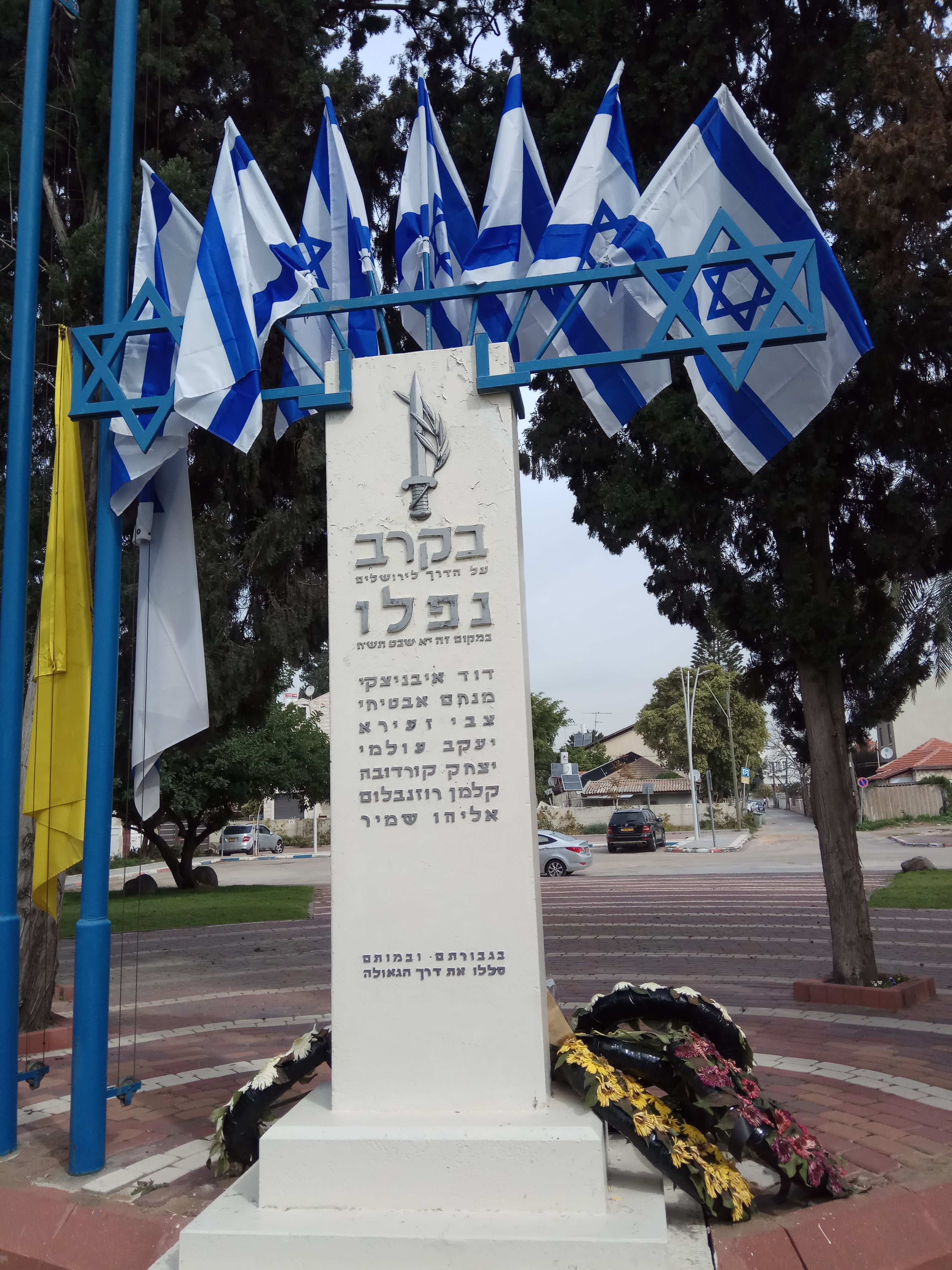 אנדרטה לזכר שבעת הנוטרים באזור